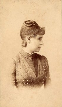 Laczkó Aranka (1861-1953) 26 éves korában